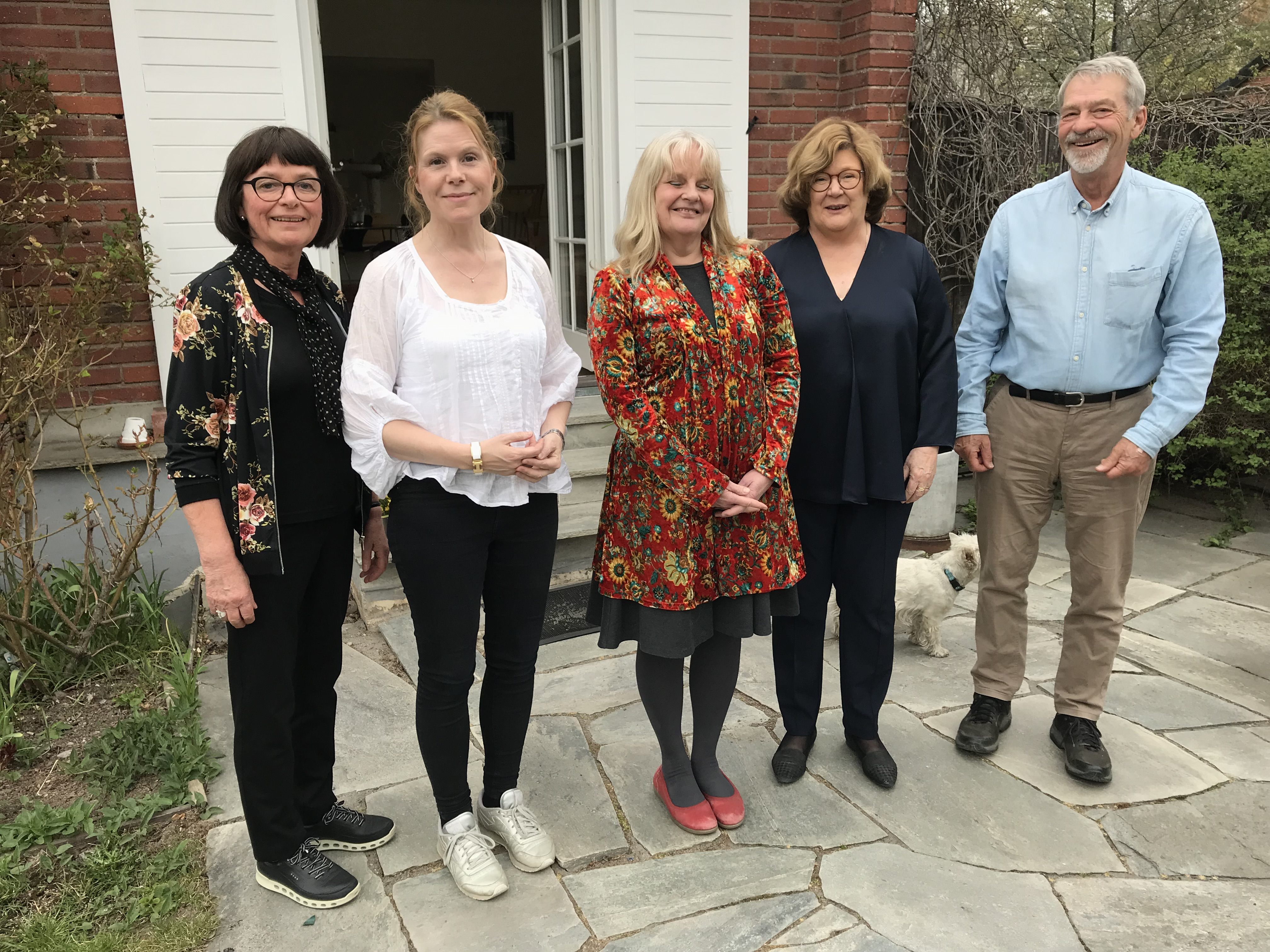 Juryn vid möte april, 2019. Fr v: Margareta Krig, Hedvig Lagerkvist, Maria Küchen, Majgull Axelsson och Jonas Modig.